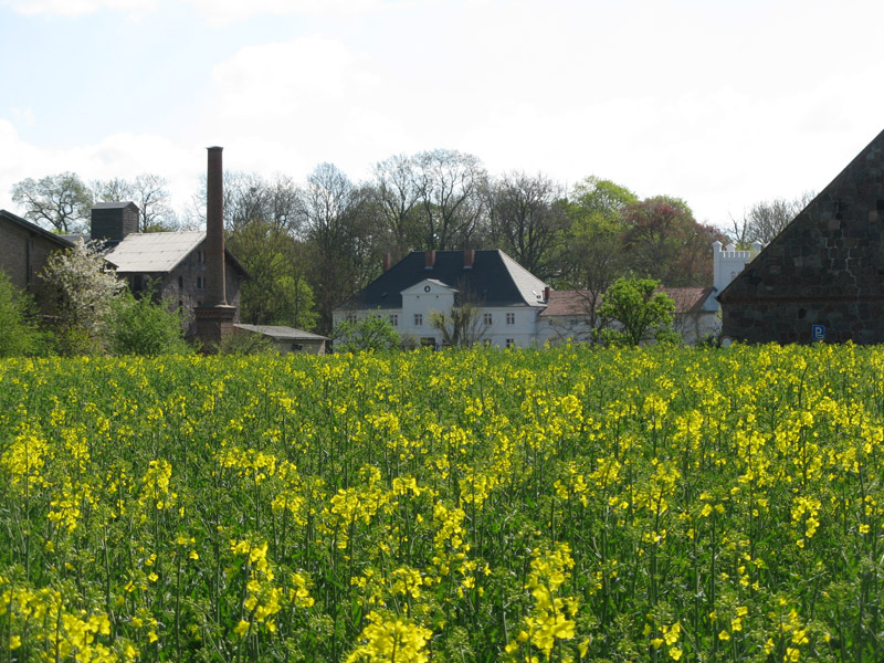 Blick auf das sanierte Gutshaus